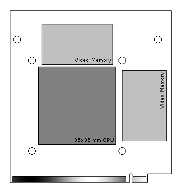 Darstellung eines MXM (Mobile PCI Express Module) Typ II für 35 mm GPU